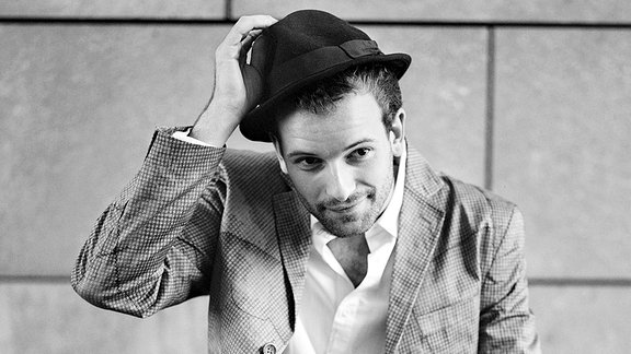 Portrait 2013